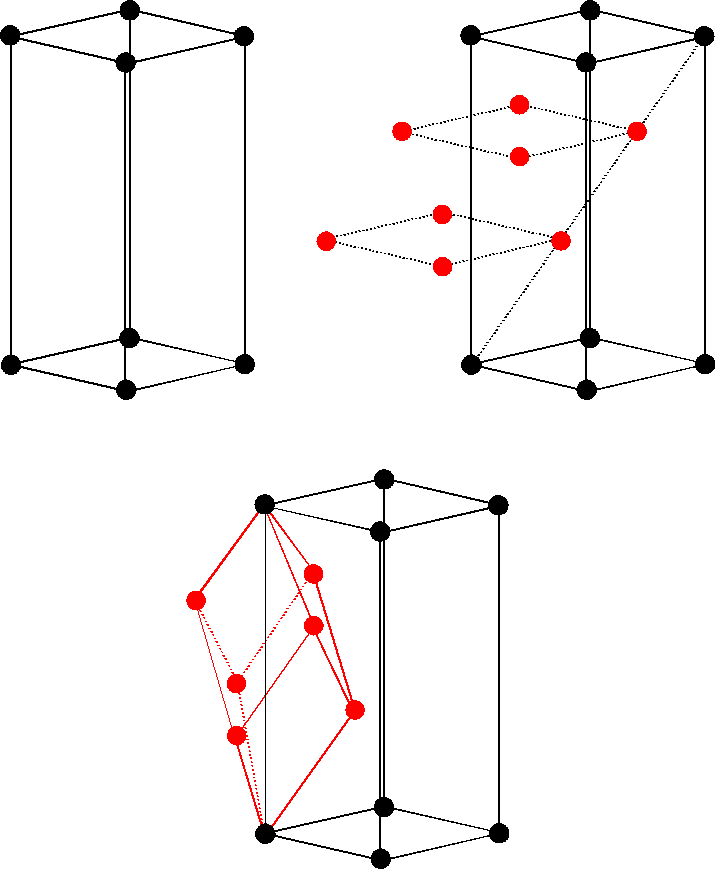 Figure dessinnée par Mahlerite avec OpenOffice 1.5 Licensing Catégorie:Schémas